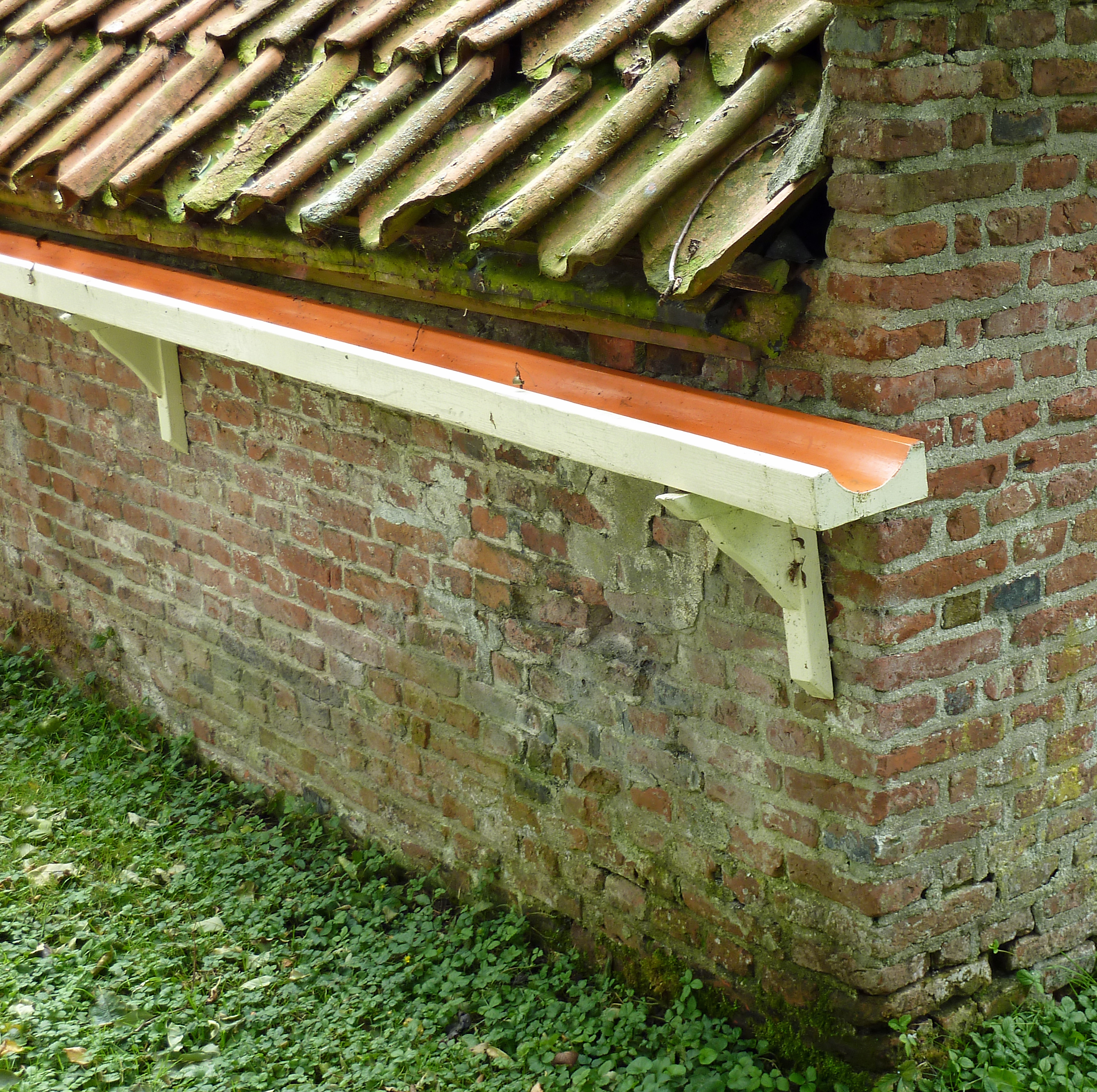 Houten goot in het Zuiderzeemuseum te Enkhuizen